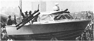 ספינת תקיפה מצרית דגם ברטרם